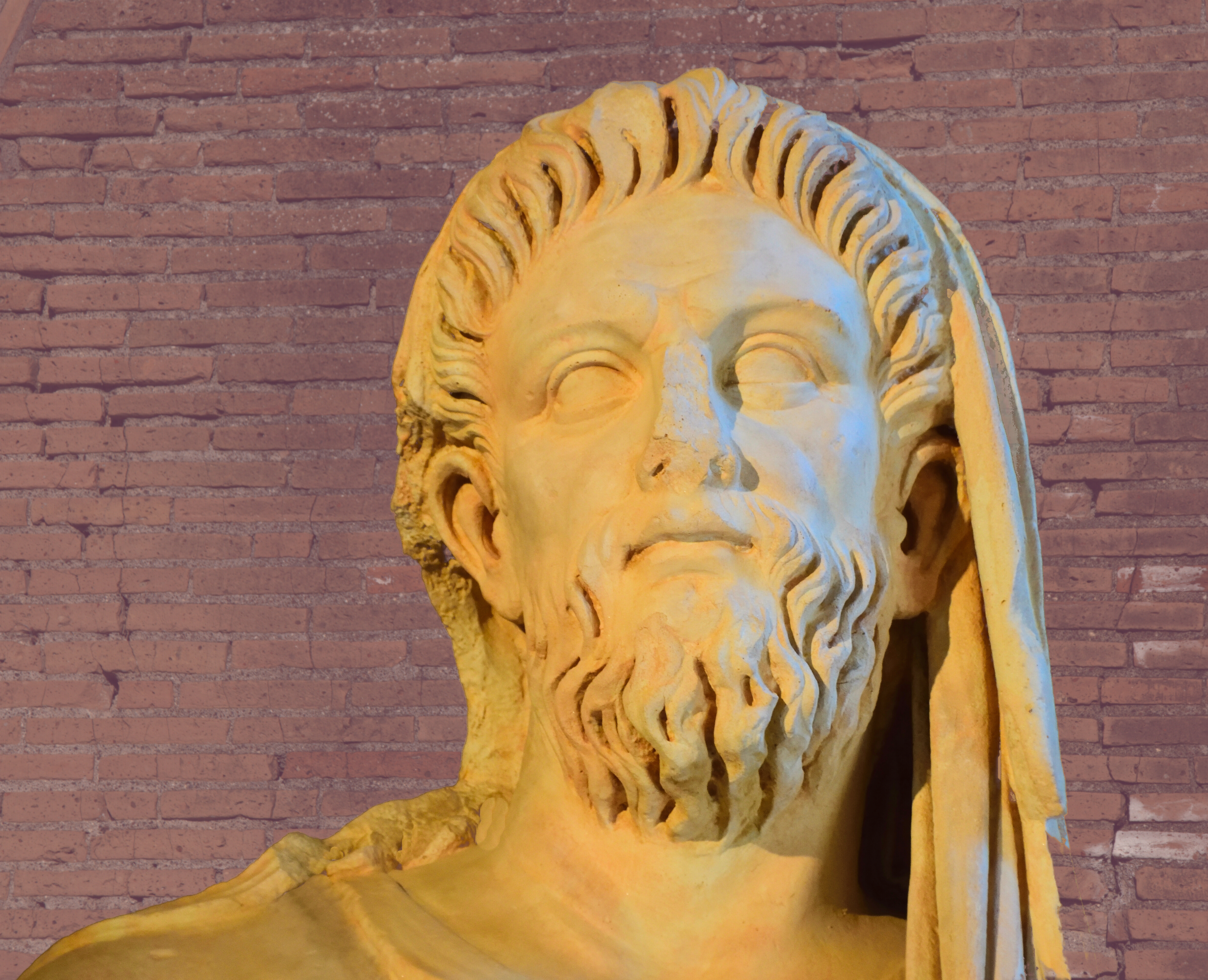 Haupt des Anchises, ein Fragment (Replik) aus einer Statuengruppe, die mit Aeneas und Ascanius die Flucht aus Troja dargestellt hat. Die erhaltenen Originalfragmente aus dem 1. Jahrhundert befinden sich im Museo Nacional de Arte Romano of Merida (Spanien)